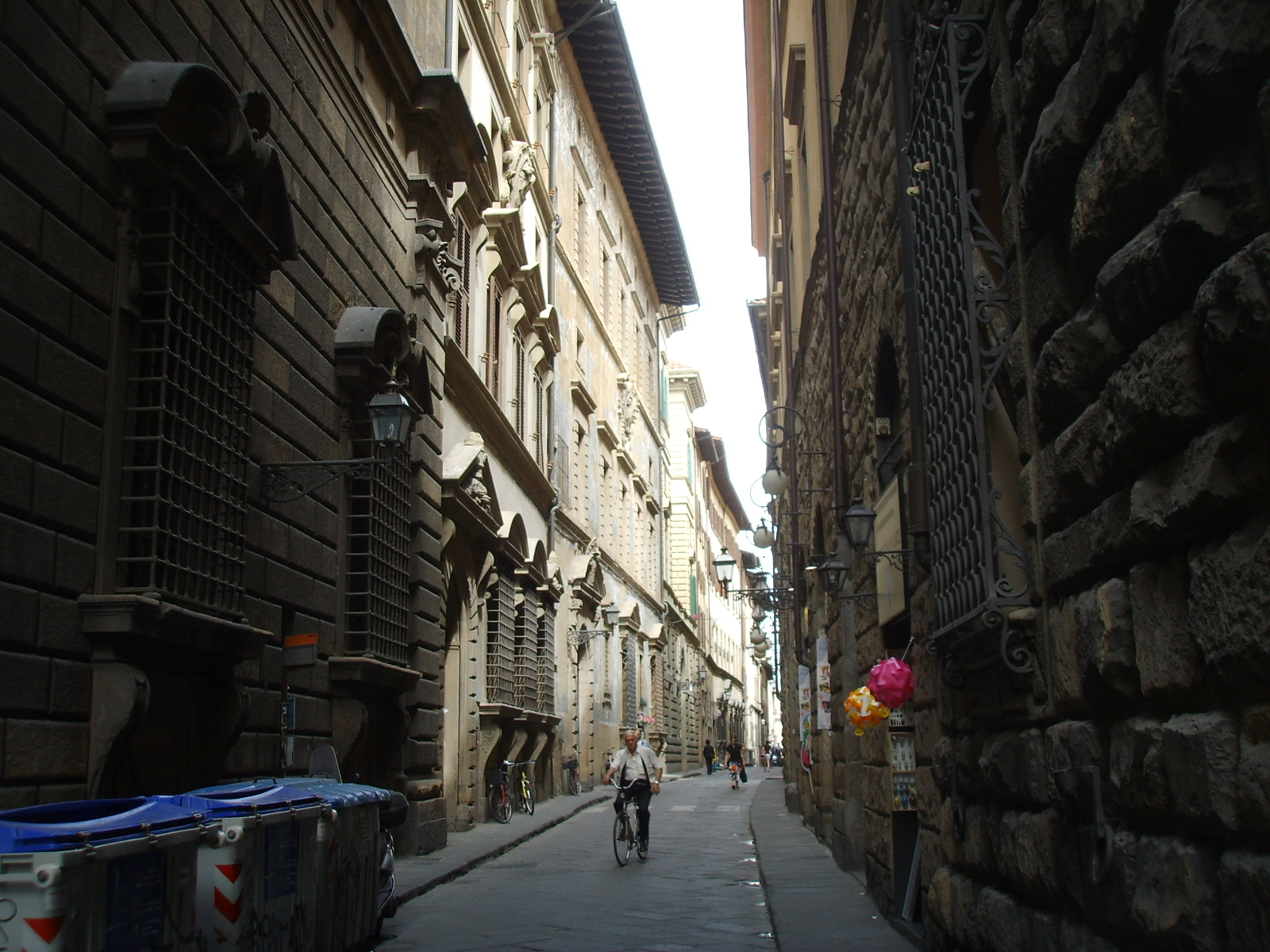 Borgo albizi, view